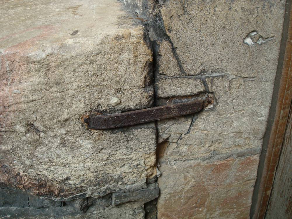 Agrafe reliant deux bloc de pierre.